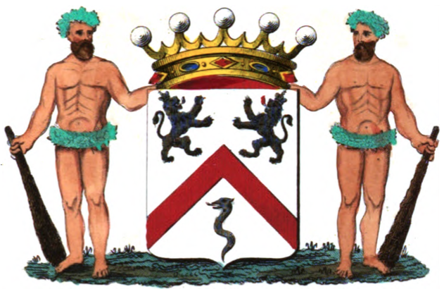 Armoiries de la famille Royer de Dour